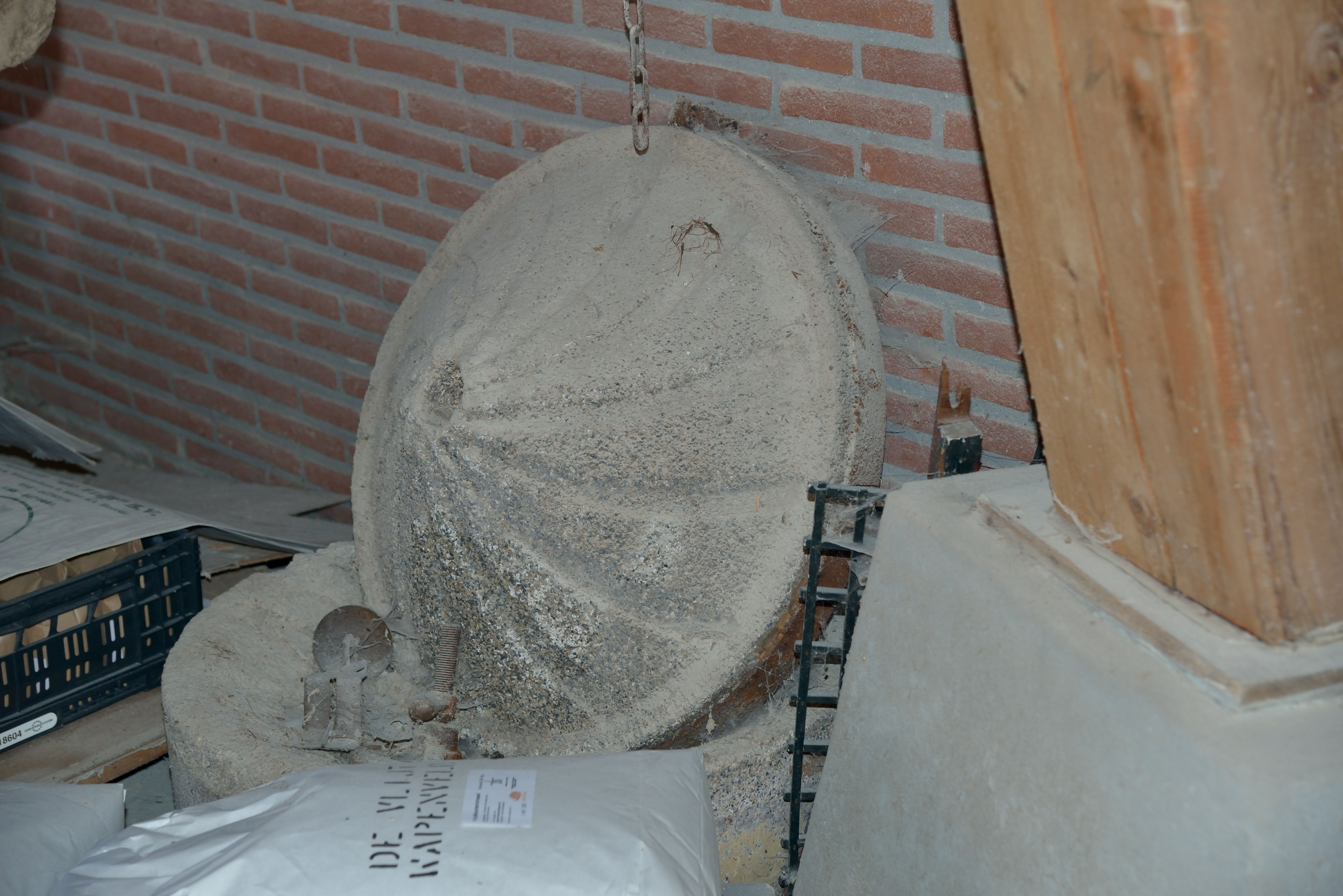 Molen De Vlijt, Wapenveld